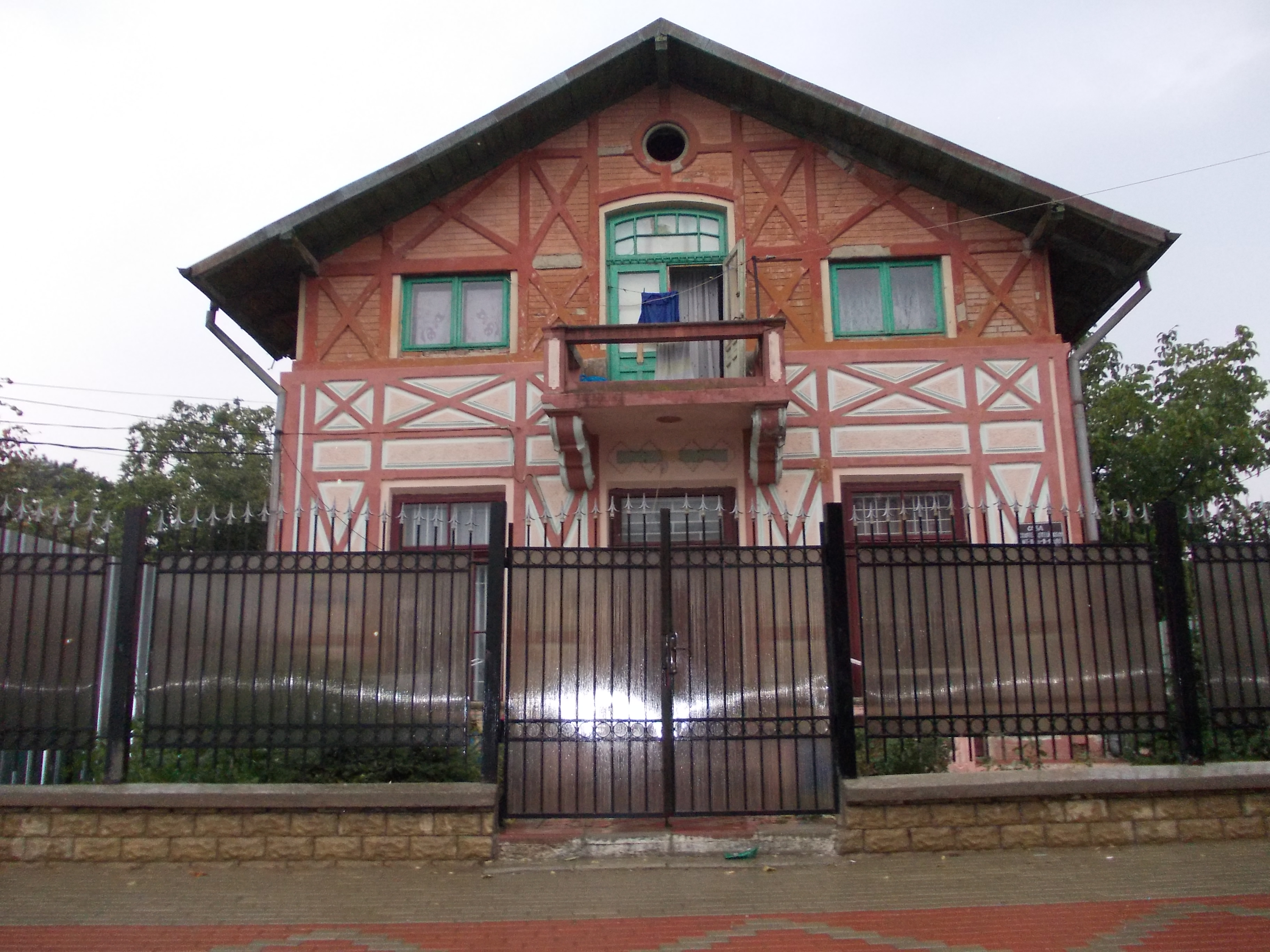 Casa Cristea Ștefănescu